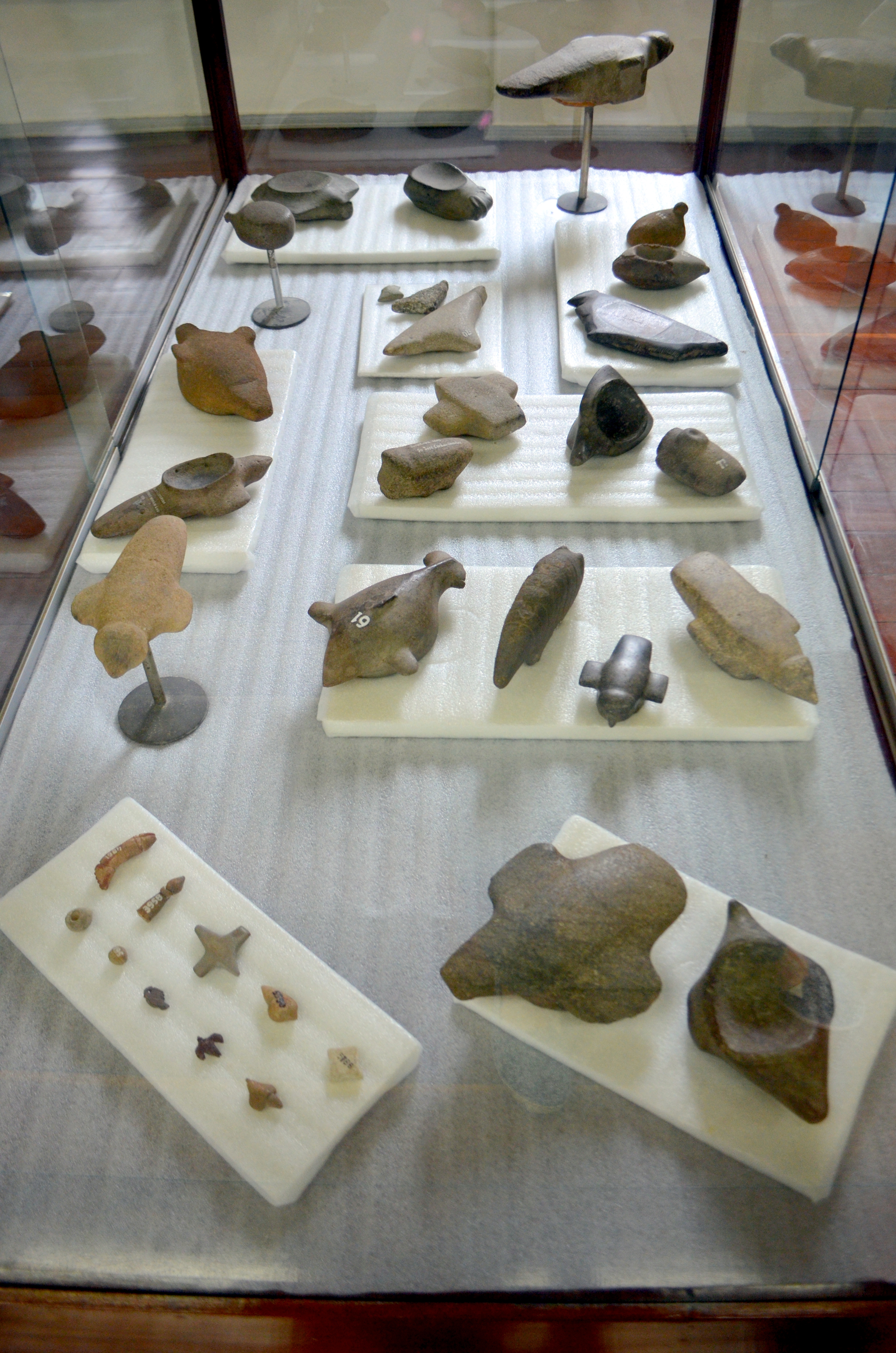 Coleção Arqueológica João Alfredo Rohr, assim distribuida: as peças depositadas nas dependências particulares do Colégio Catarinense; as peças em exposição no Museu Homem do Sambaqui